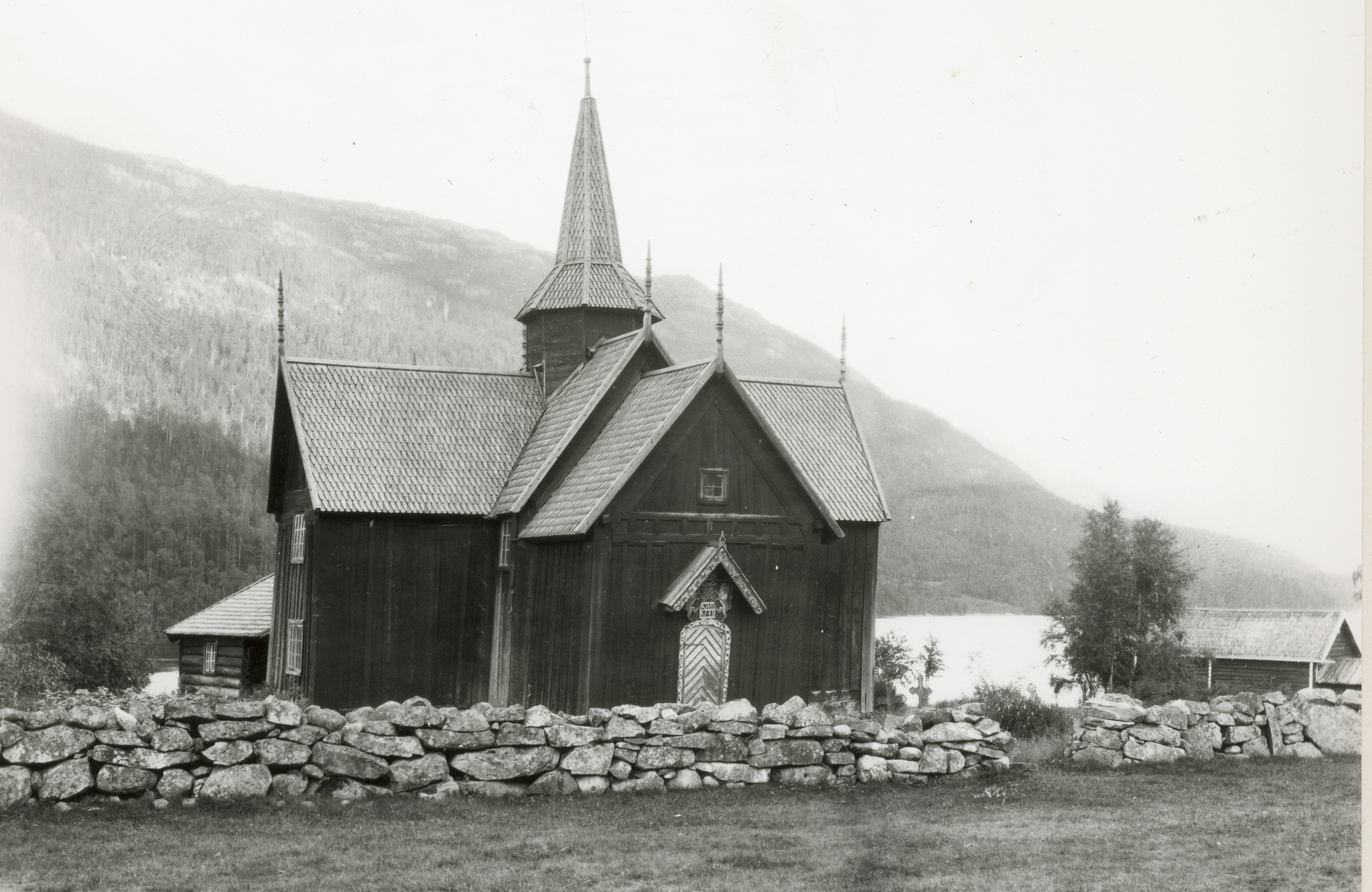 Nore stavkirke Fra vest Fotograf: Meyer, Johan (1860-1940) Datering: 1931 1931 Sted: Nore Buskerud Se flere bilder på Kulturminnebilder